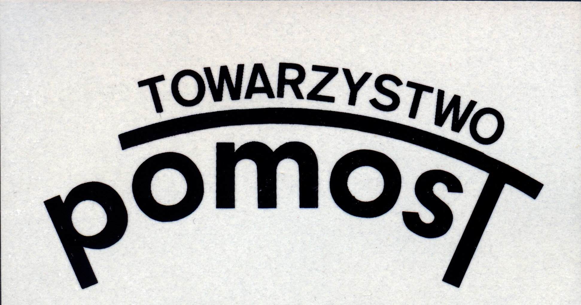 Logo "Towarzystwa Pomost" używane podczas jego istnienia m.in. na plakatach informujących o spotkaniach organizowanych przez to stowarzyszenie.